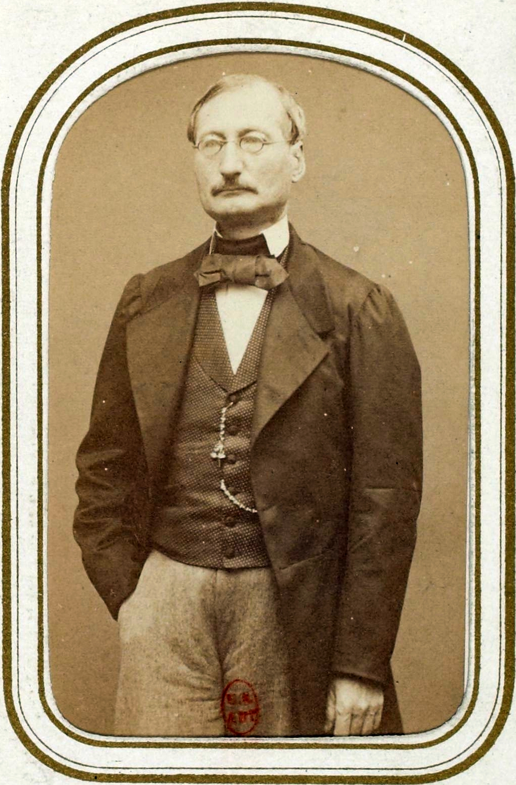 [Recueil. Personnalités des arts et des lettres] : vue 18 - F. 6v. Élie Berthet (Carjat phot.)